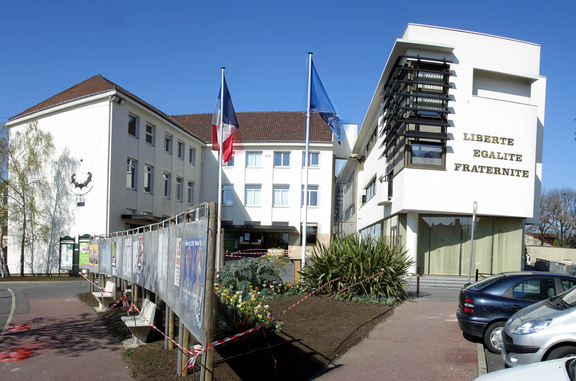 Hôtel-de-Ville de Villepinte (Seine-Saint-Denis), France